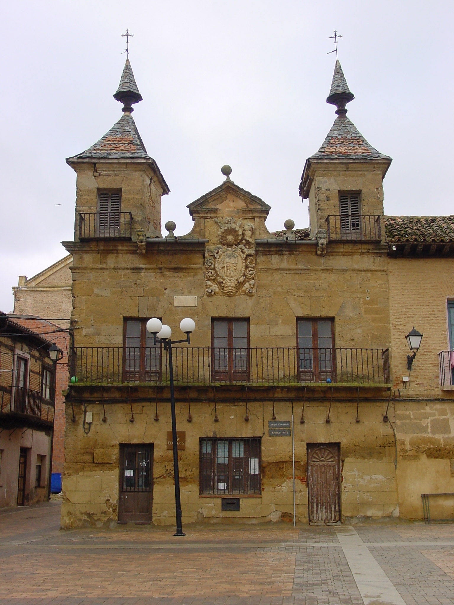 Valderas (León, España). Edificio de Correos en la antigua Casa Consistorial (1701).